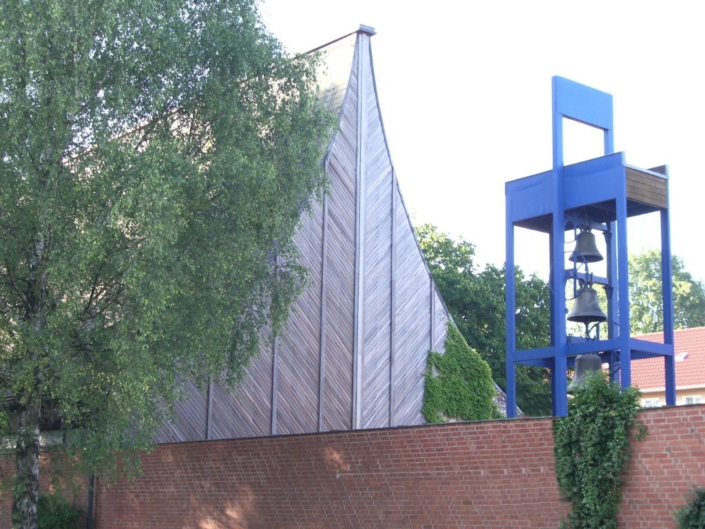 Erding Erloeserkirche